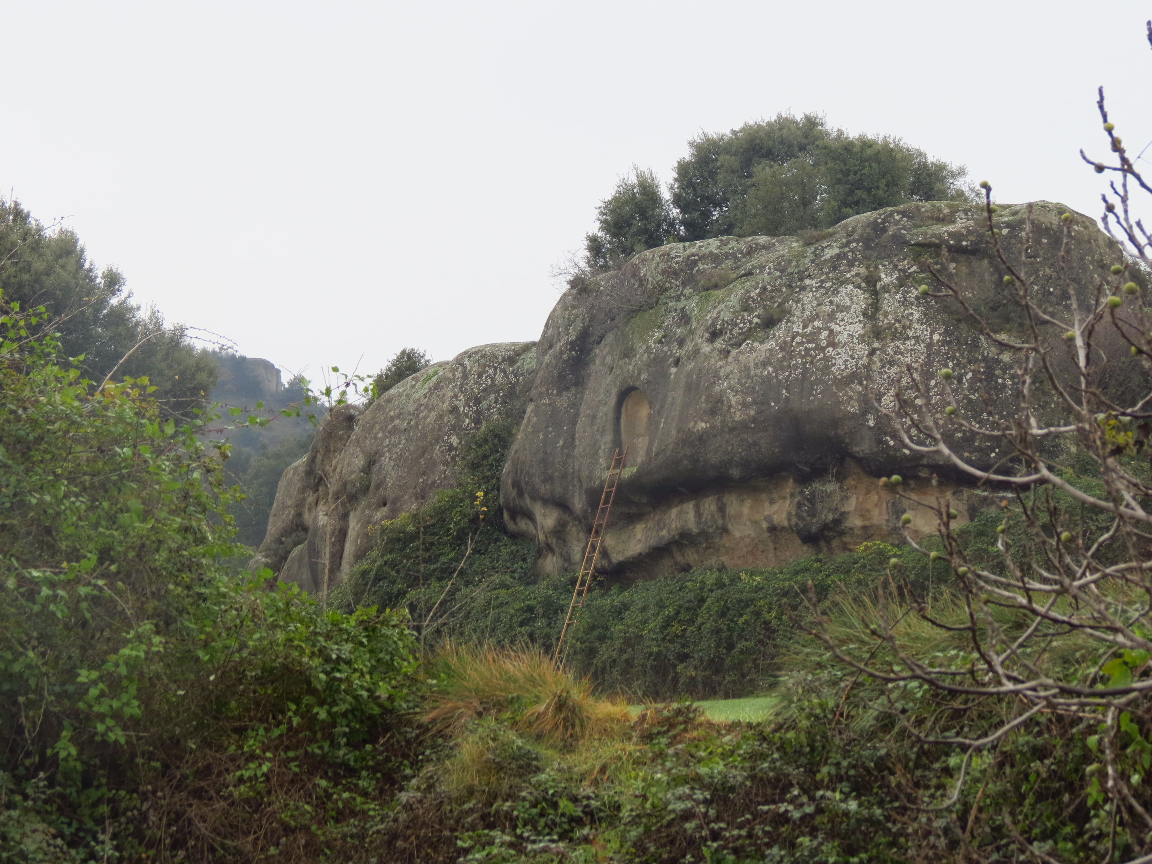 capella